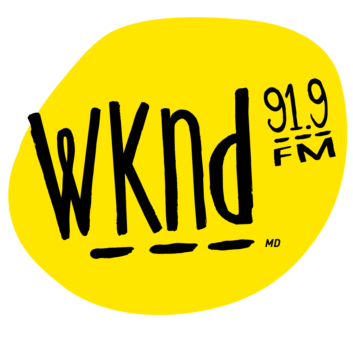 Logo-WKND-919